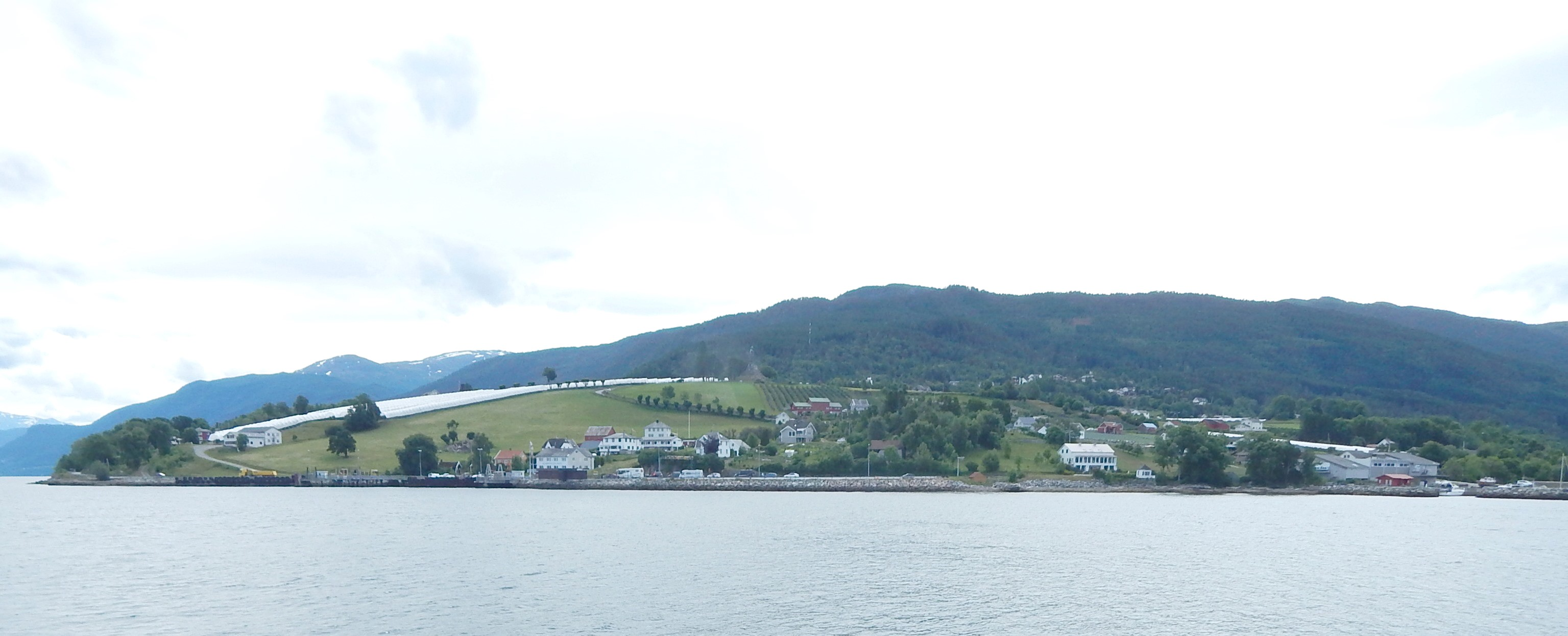 Vangsnes sett fra fjorden